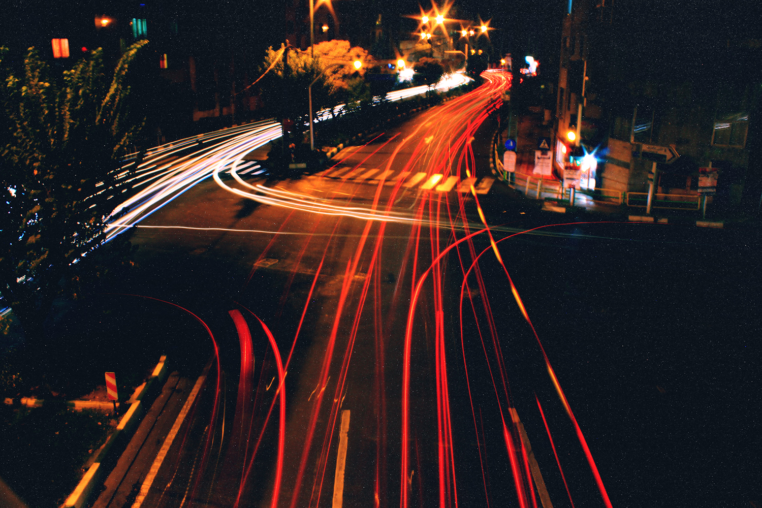 خيابان گلبرگ، شانزده مترى دوم